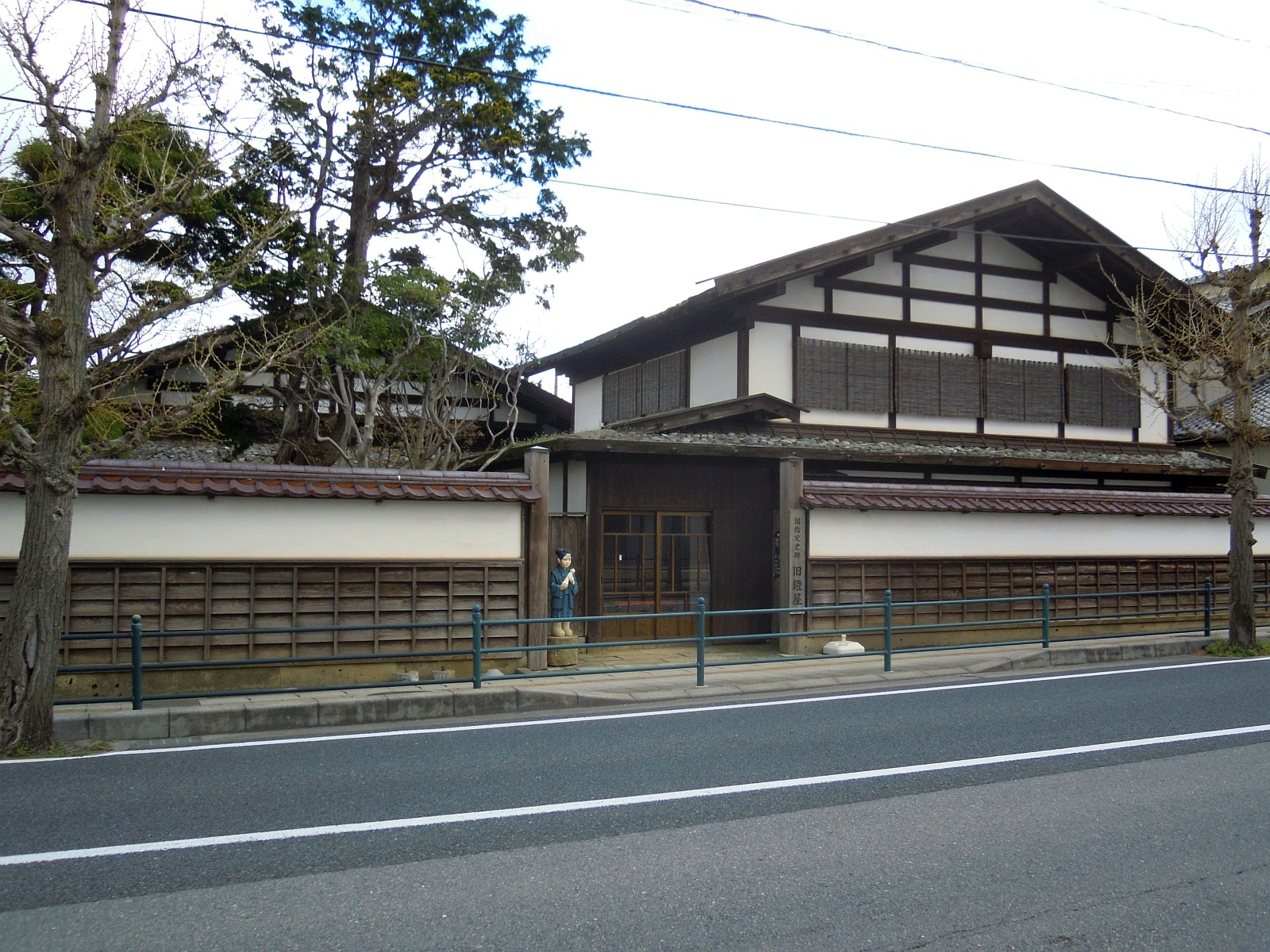 山形県酒田市にある国指定史跡の旧鐙屋を大戸口側から